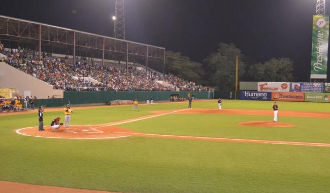 Manny Ramirez enfrentando a Kevin Pucetas en el Julian Javier.